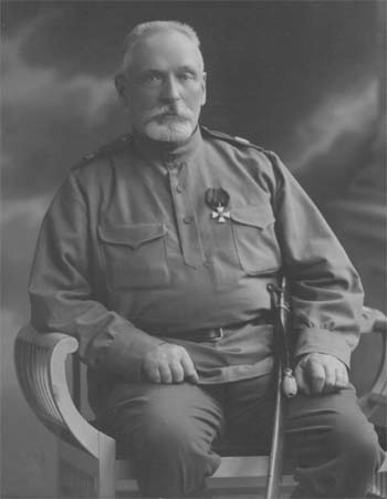 Генерал от инфантерии Евгений Александрович Радкевич